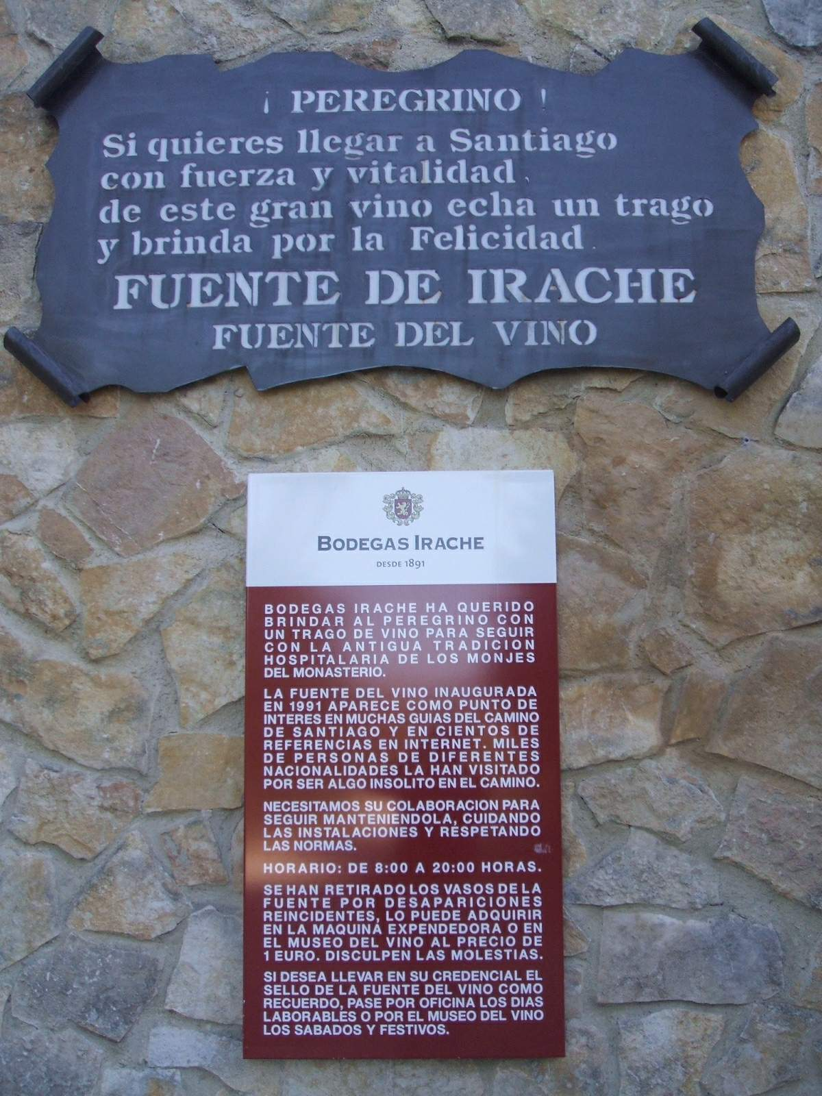 Monasterio de Irache (Navarra). Fuente de agua y vino